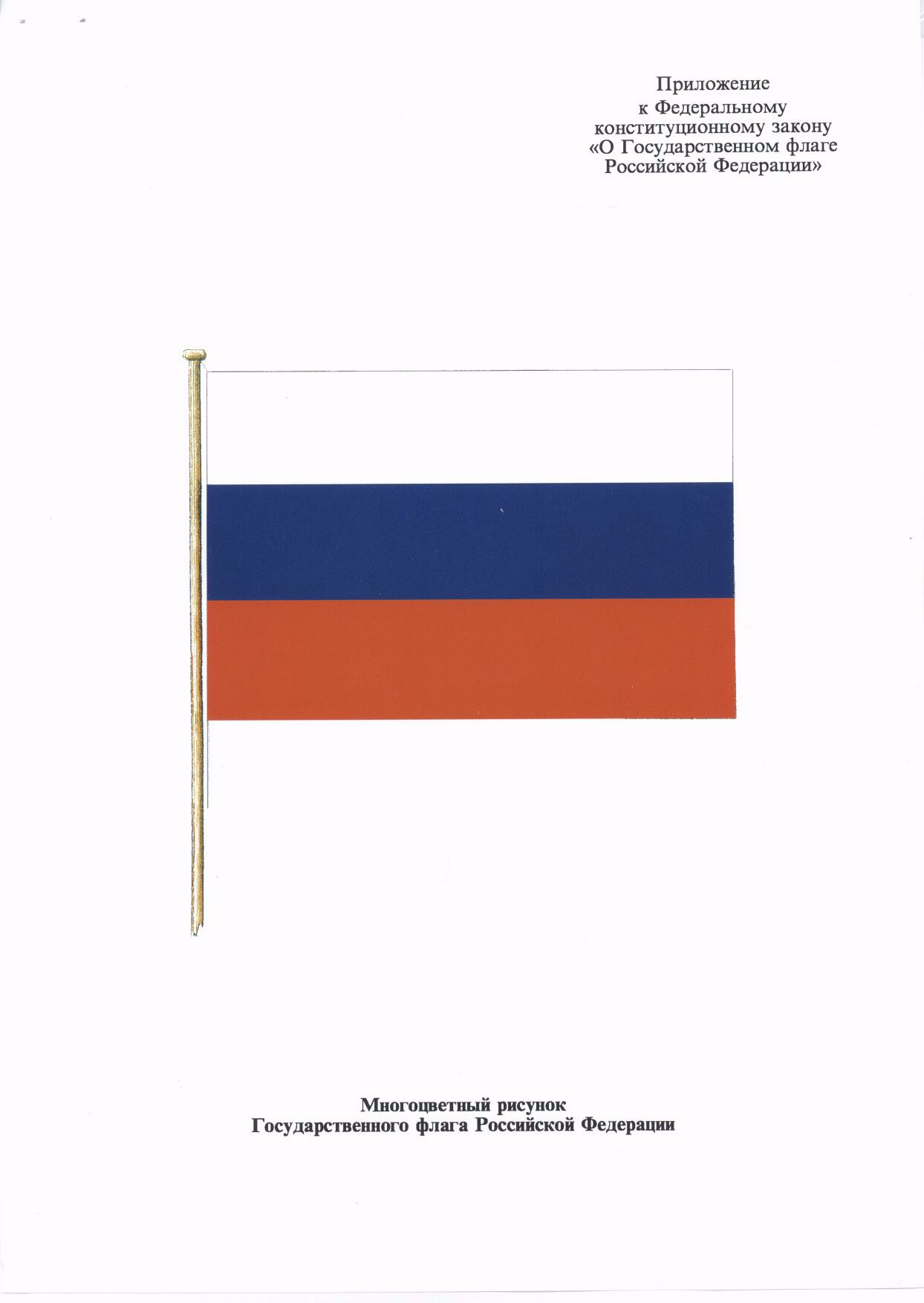 Многоцветный рисунок Государственного флага Российской Федерации, приложение к Федеральному конституционному закону России «О Государственном флаге Российской Федерации»